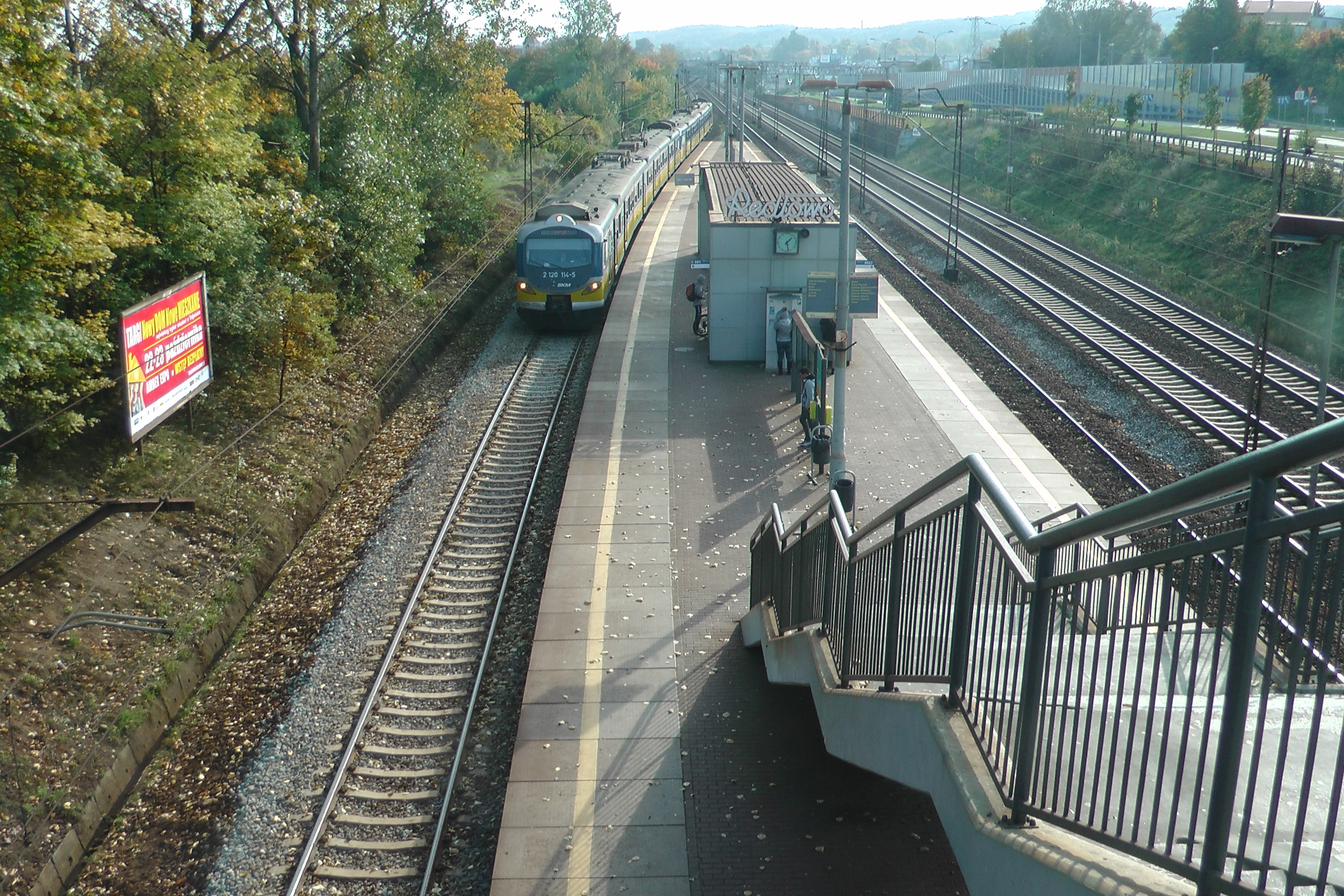 Stacja SKM Gdynia Redłowo